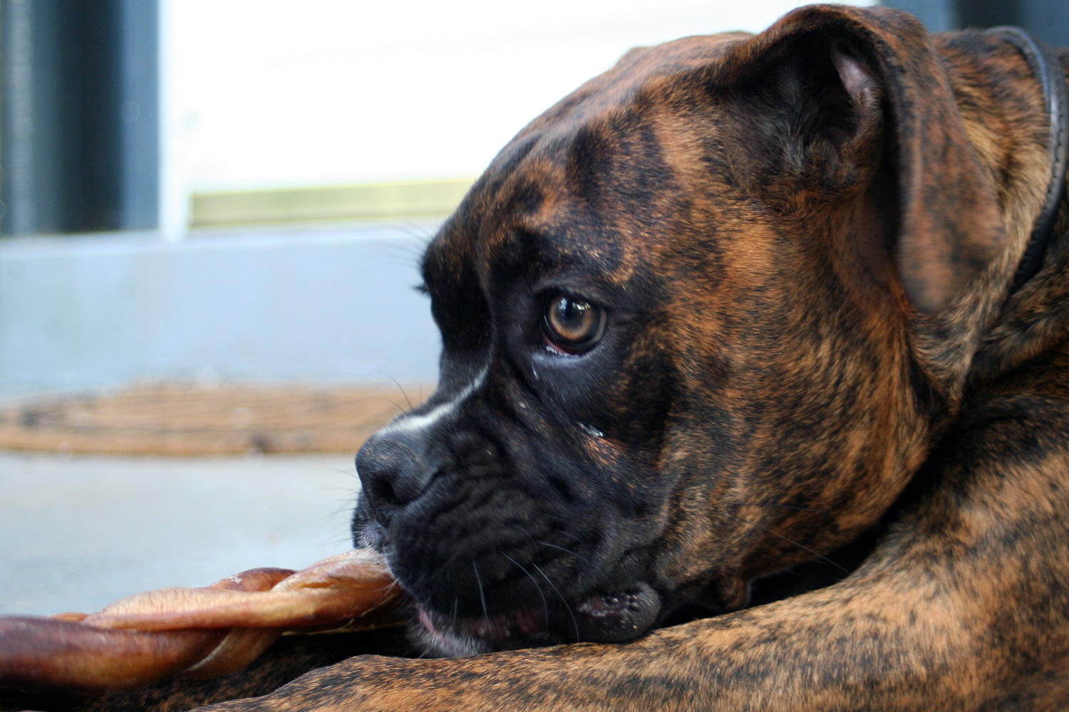 A male brindle Boxer.